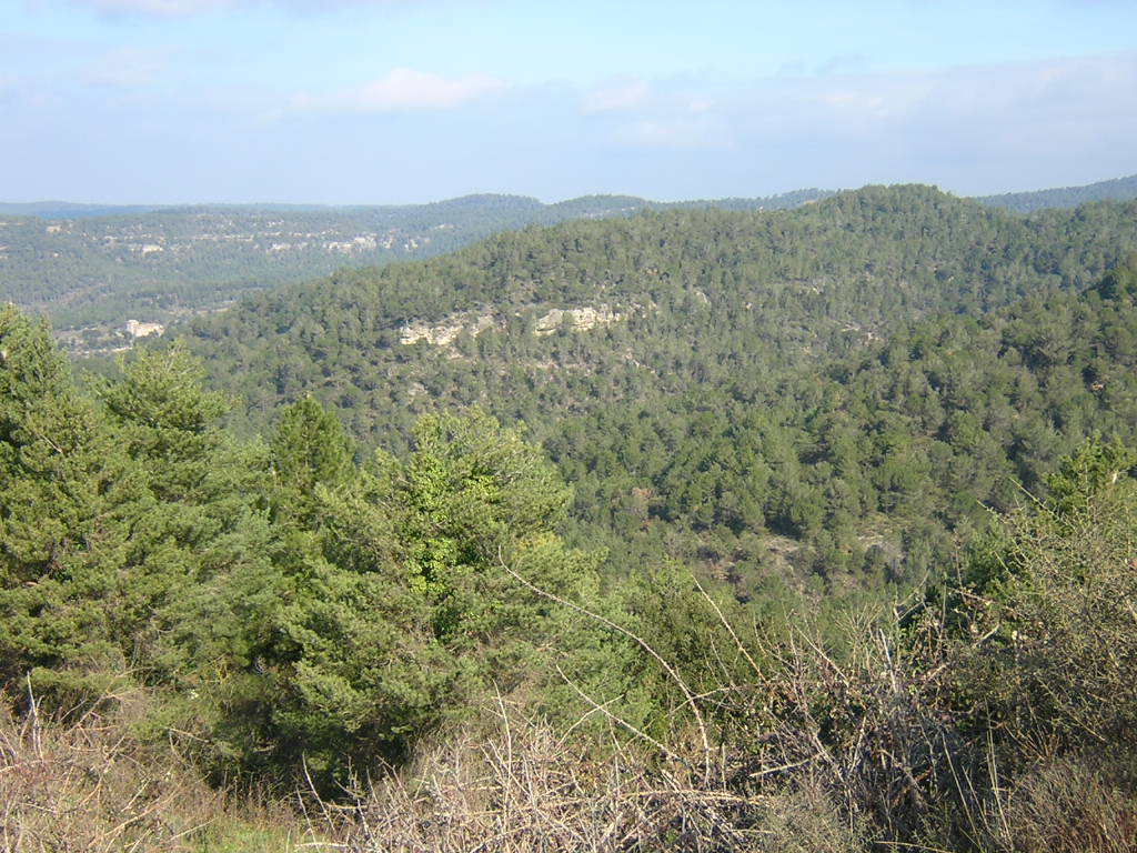 La Muntanya de la Sala, des del Coll (Monistrol de Calders, Moianès)